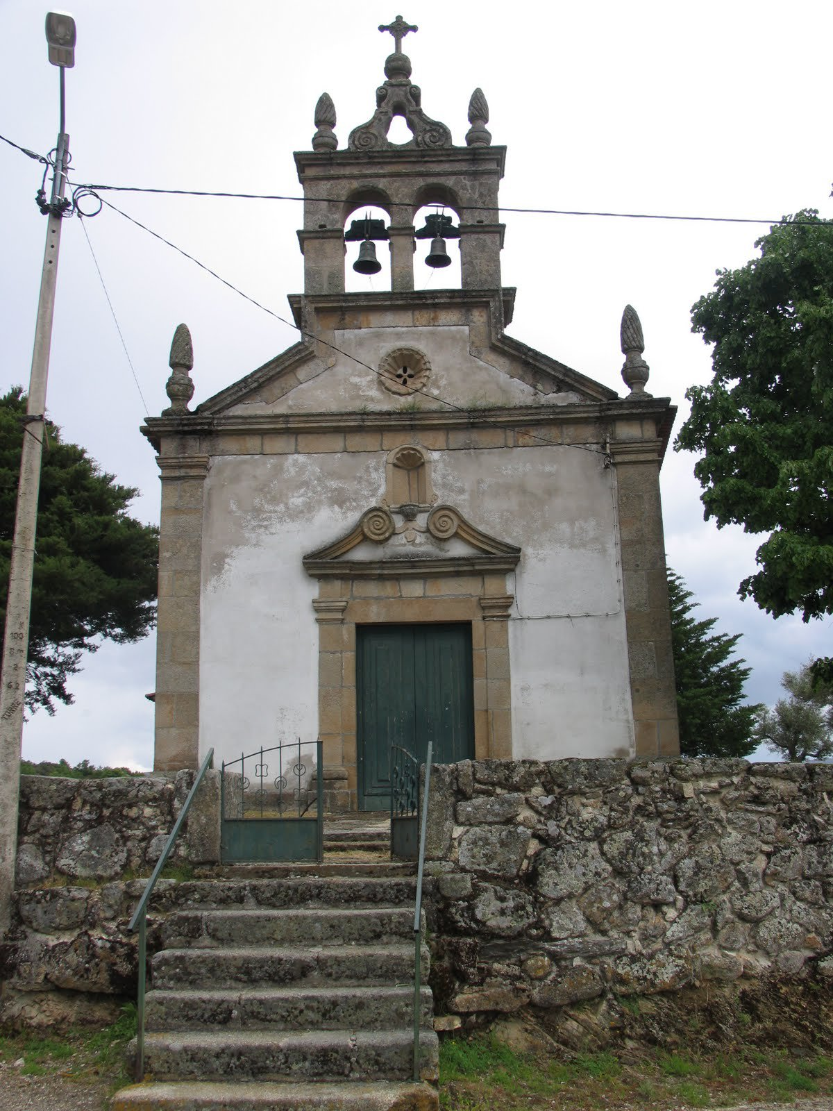 Igreja de Guide, freguesia de Torre de Dona Chama no concelho de Mirandela